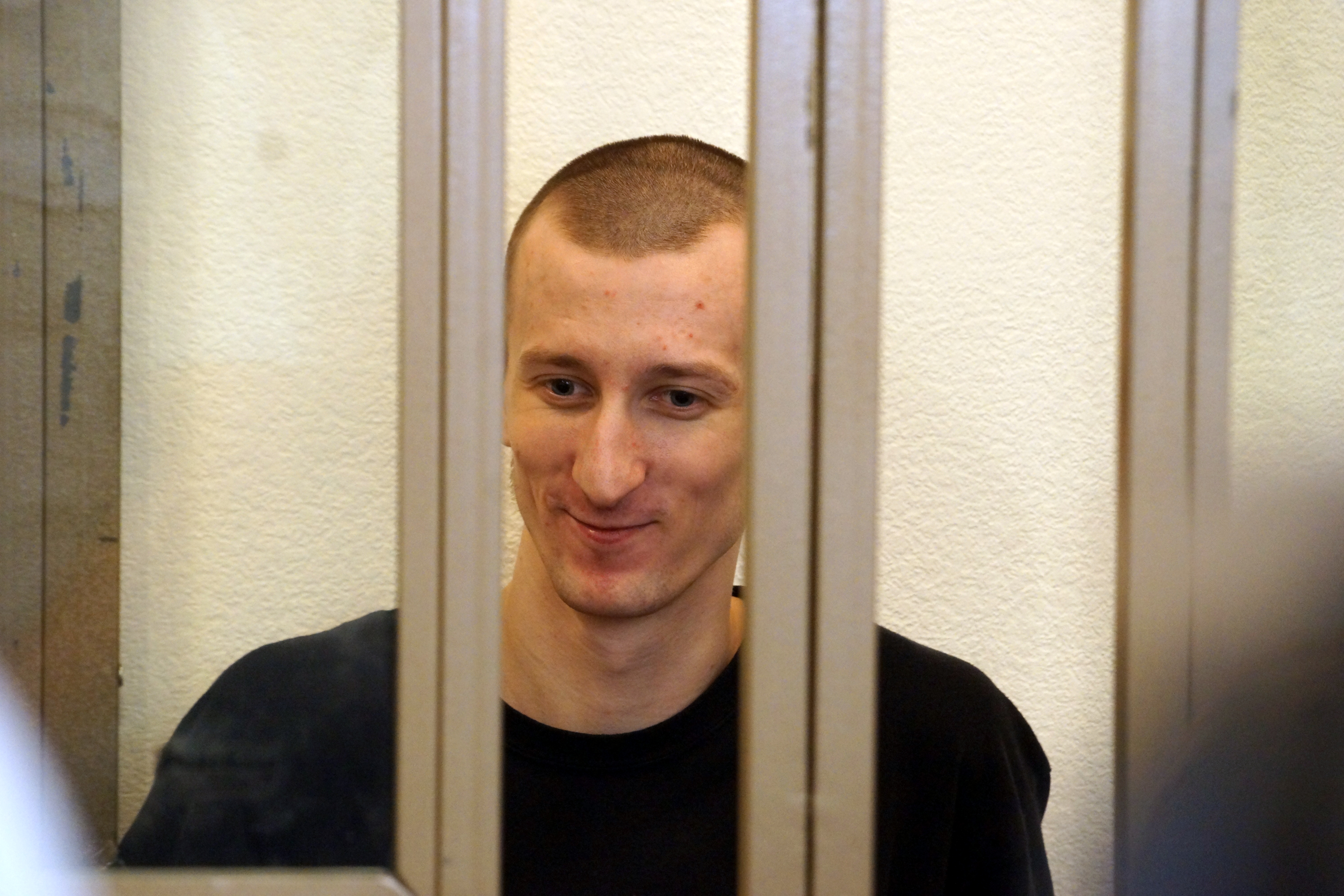 Беларуская (тарашкевіца): Аляксандар Кольчанка, расейскі палітвязень (2015)